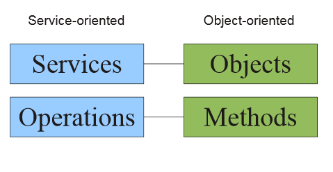 Srovnání služeb s objekty